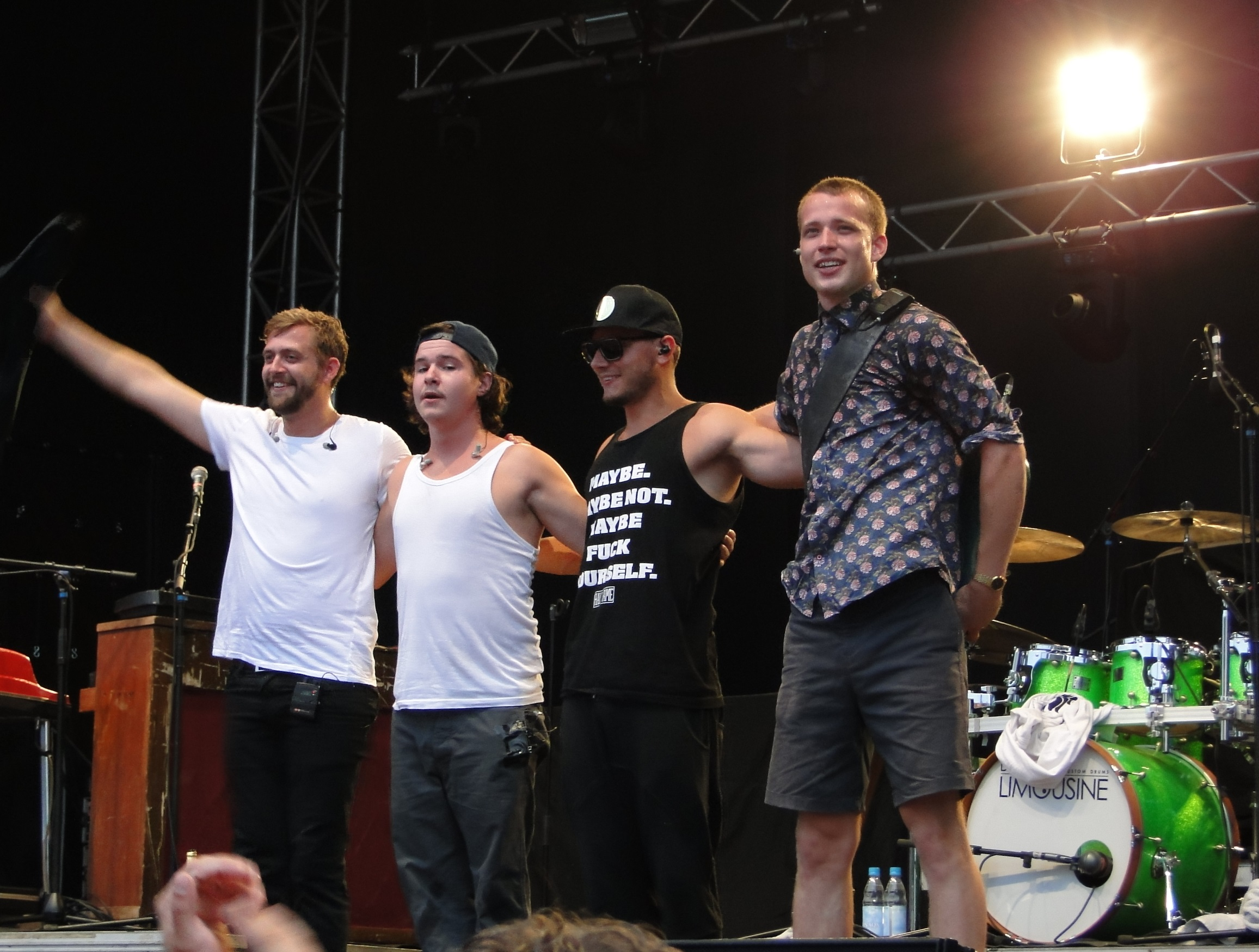 Die dänische Band Lukas Graham bei einem Auftritt in Dresden 2013